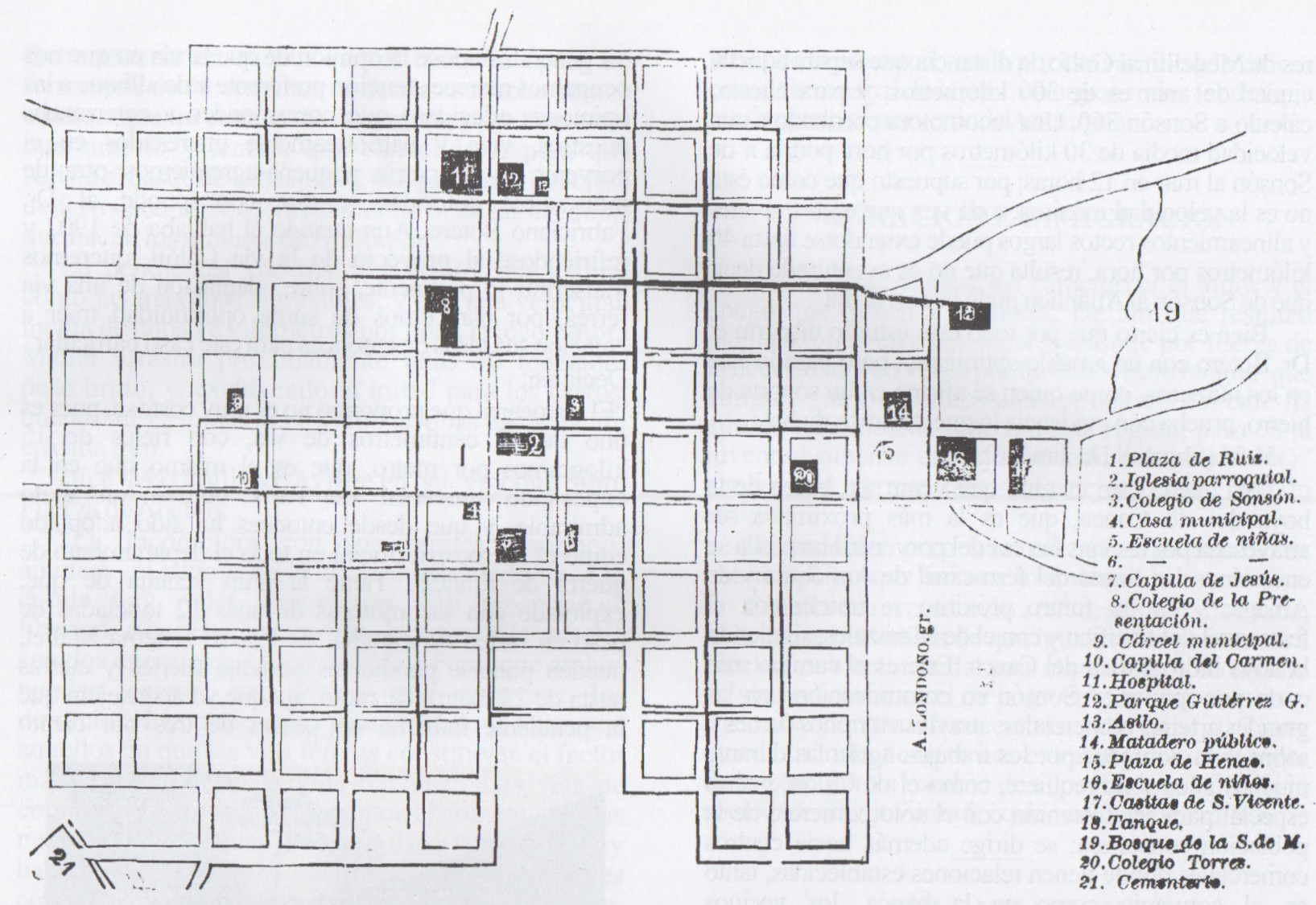 Croquis del área urbana de Sonsón y su sistema de alcantarillado en 1917.